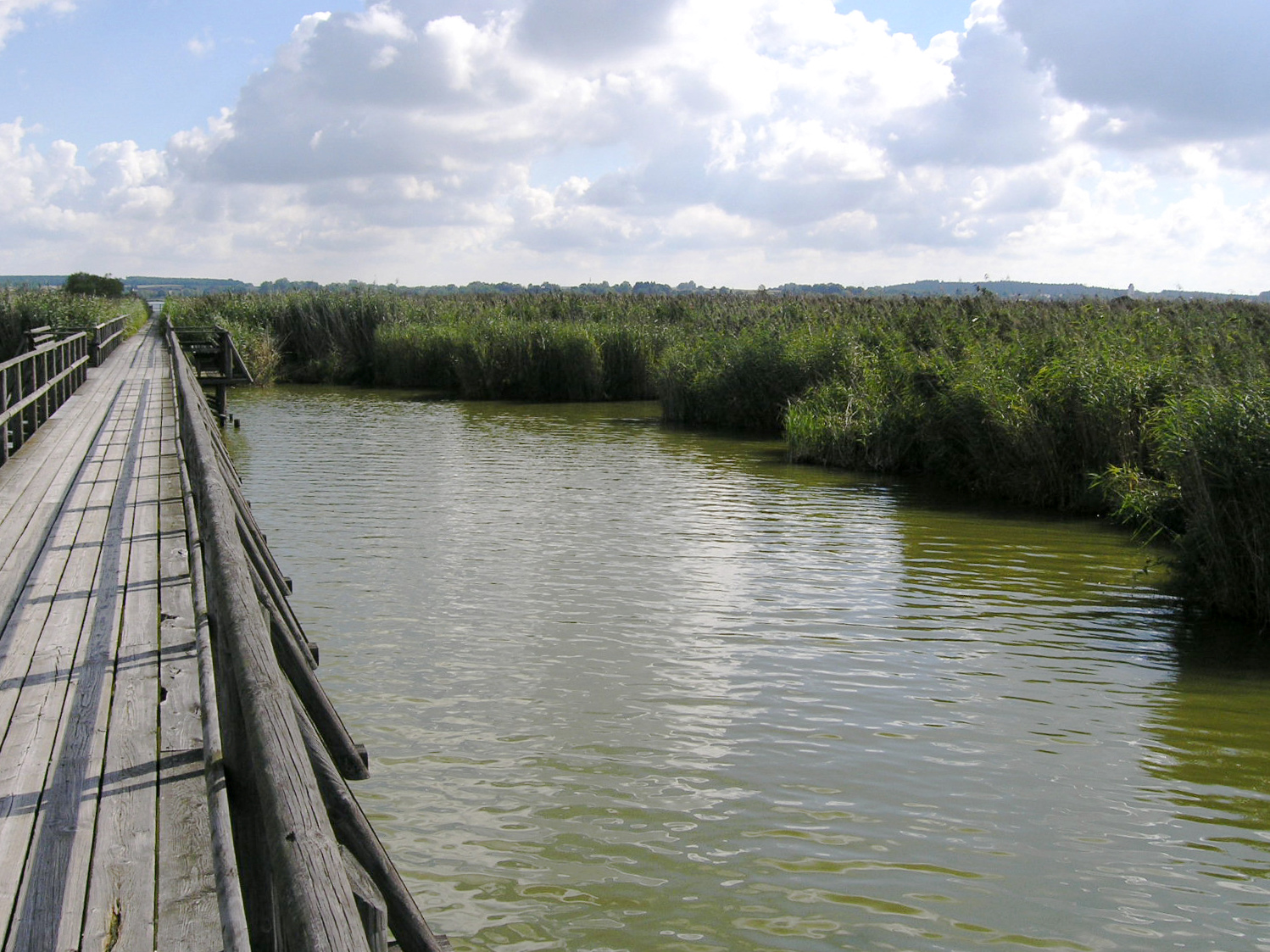 Der Federsee bei Biberach/Riss in Oberschwaben en: The Federsee near Biberach/Riss in South-West-Germany Date: 30 August 2006